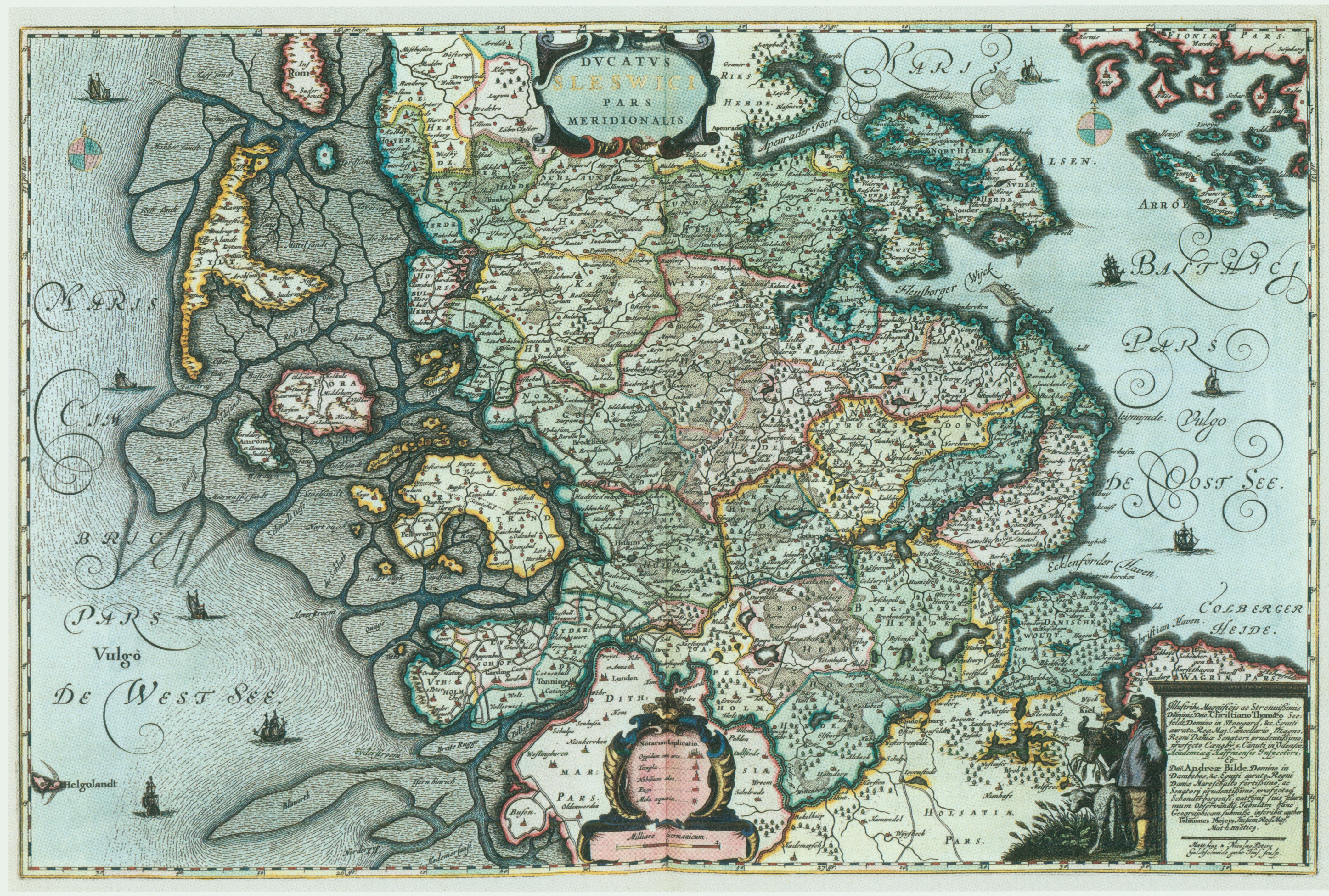 Südlicher Teil des Herzogtum Schleswig, gestochen von den Gebrüdern Matthias und Nicolaus Peters Goldschmiede aus dem Zimbrischen Husum